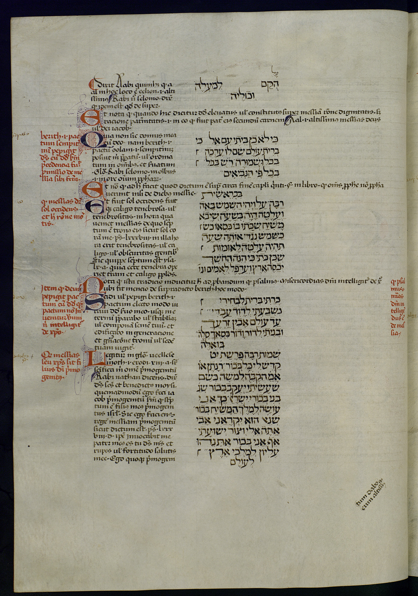 Ramon Martí, Pugio christianorum